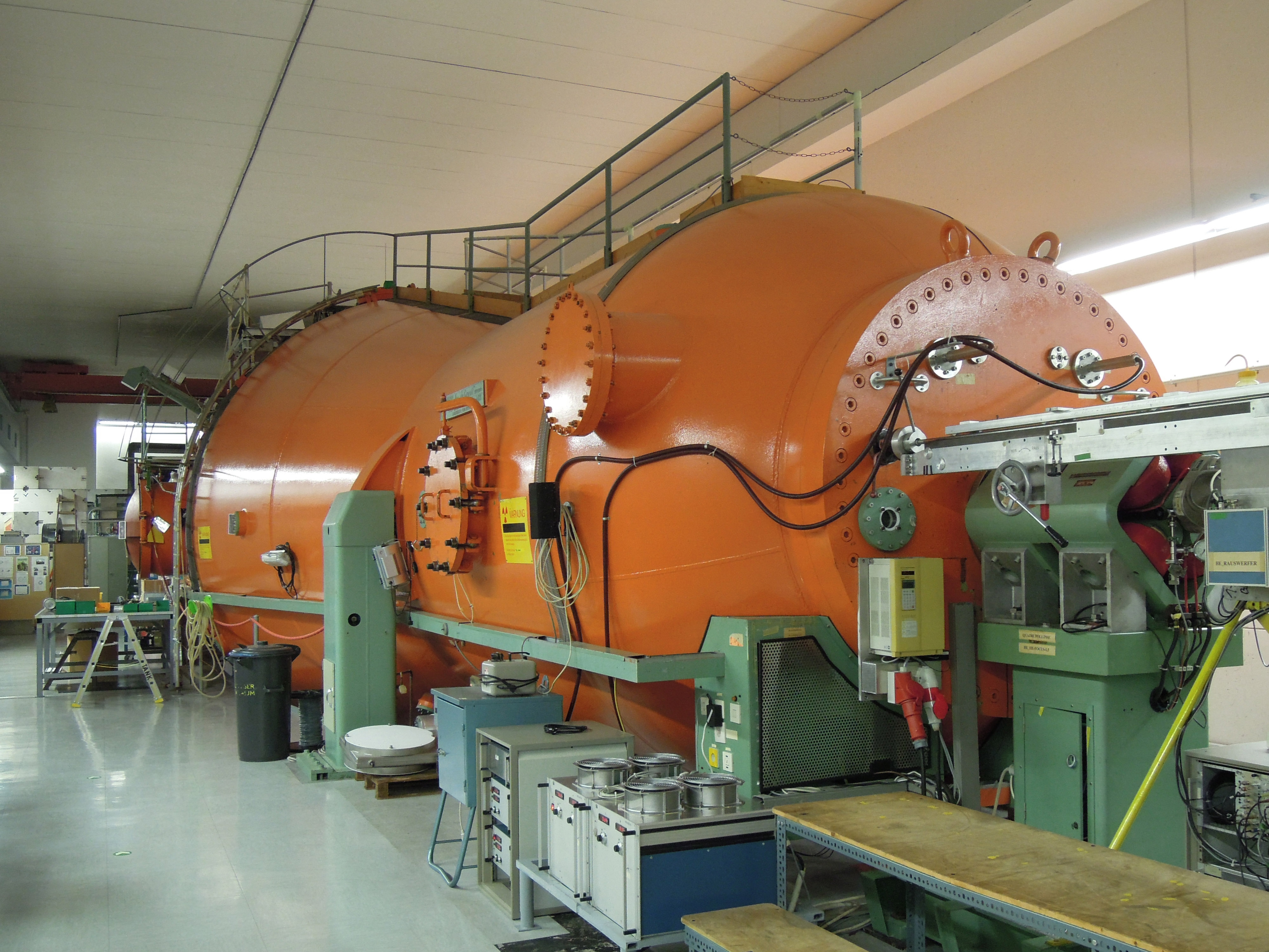 Maier-Leibnitz-Laboratorium: Tandem-Teilchenbeschleuniger